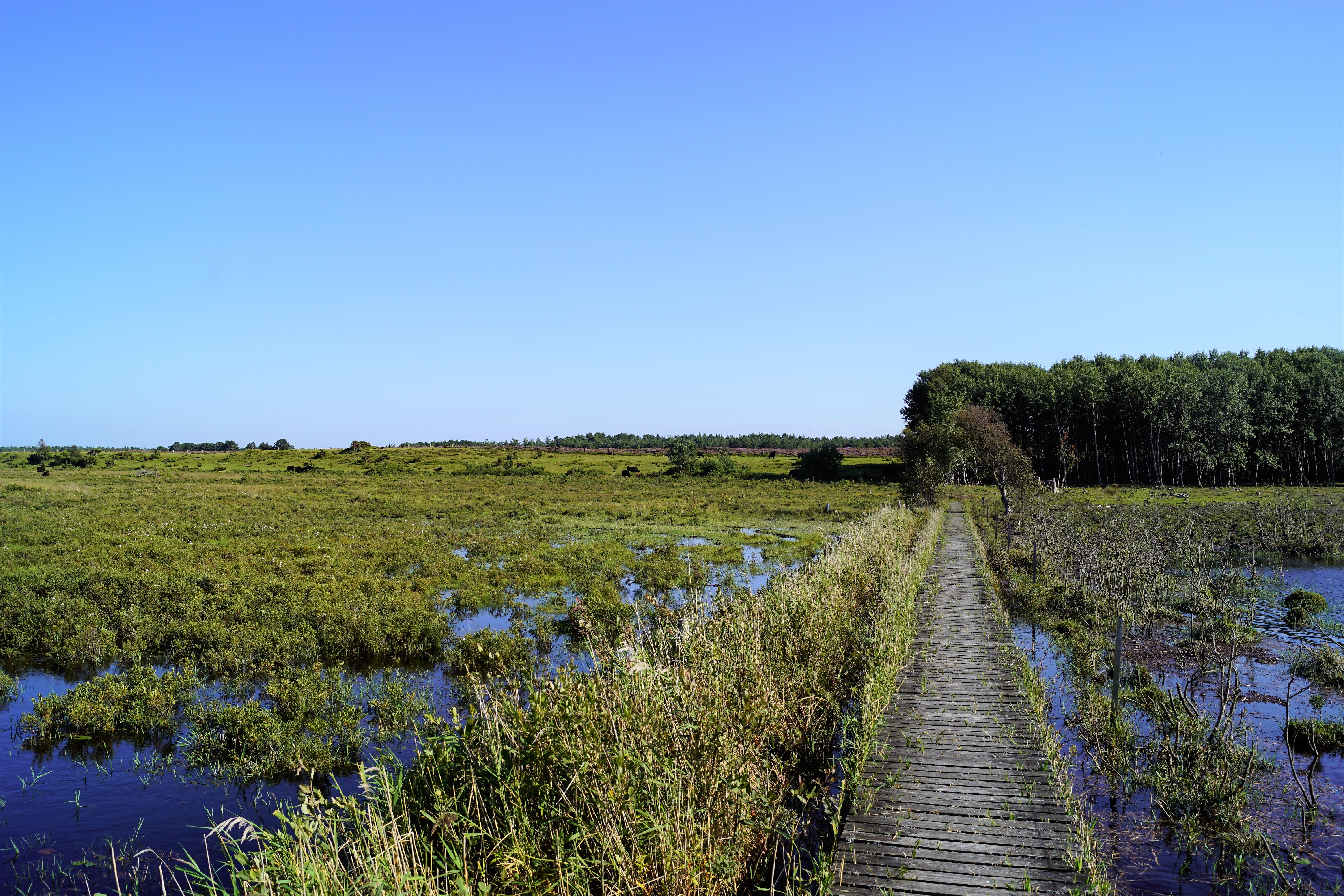 Bro over Holtemmen, set mod syd